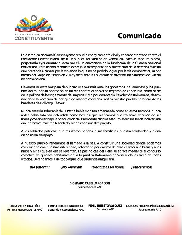 Comunicado de la Asamblea Nacional Constituyente de Venezuela ante el atentado de Caracas de 2018